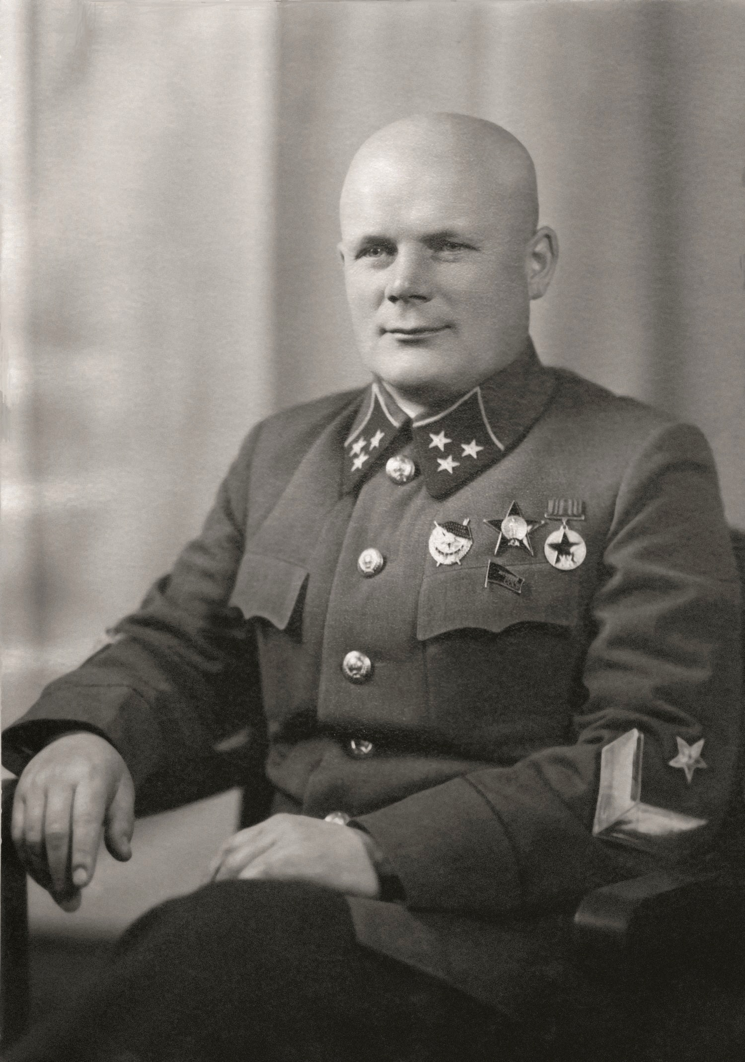 Начальник Разведывательного управления Генерального штаба Красной Армии генерал-лейтенант Ф.И. Голиков